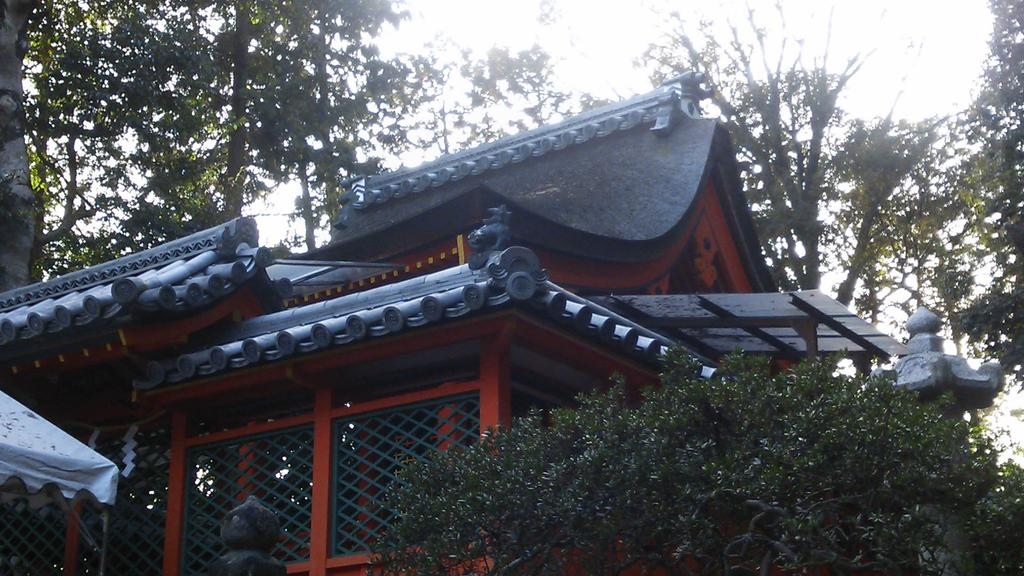 棚倉孫神社本殿